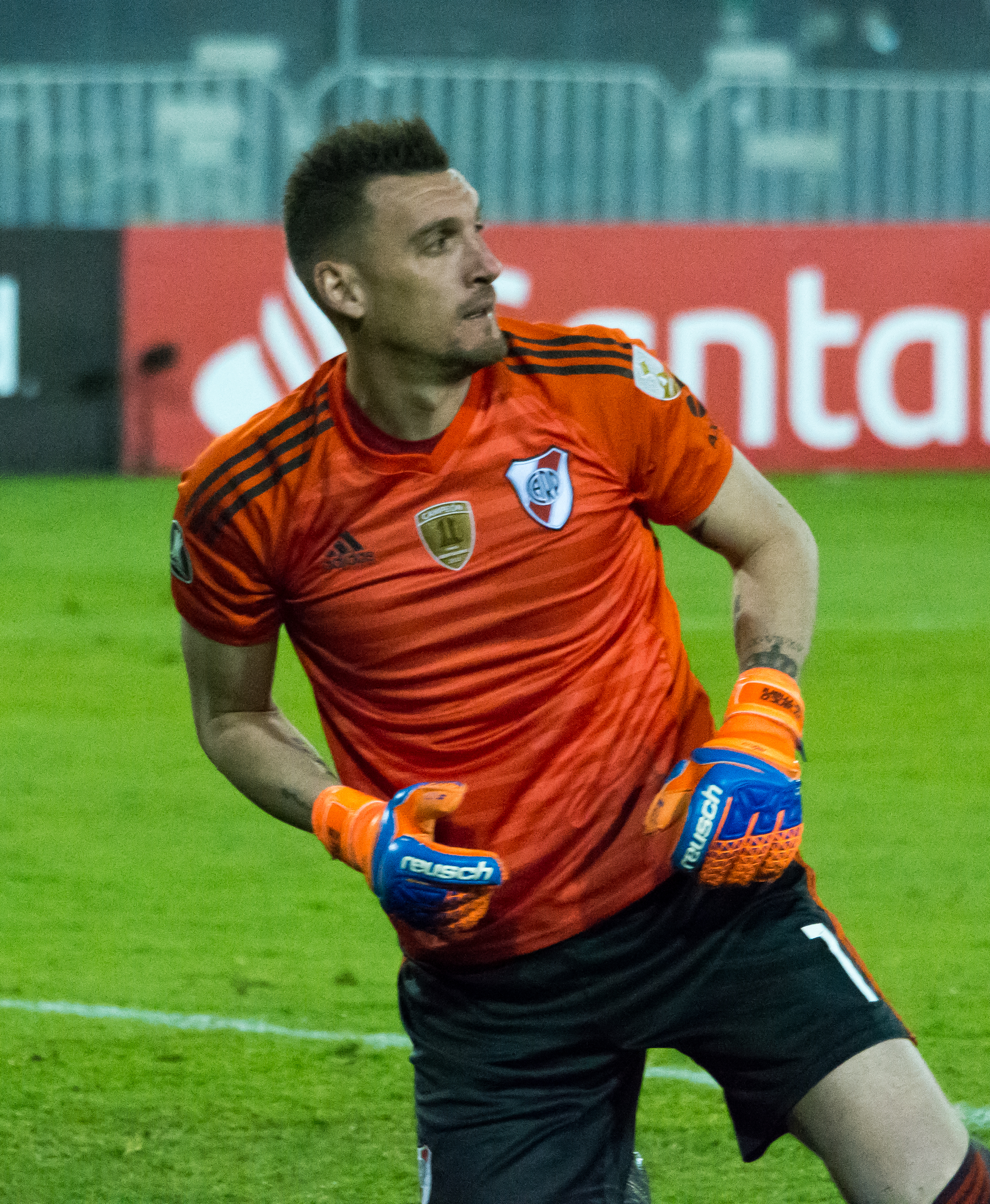 Palestino v River Plate, Estadio Monumental, Macul, Santiago, Región Metropolitana, Chile.